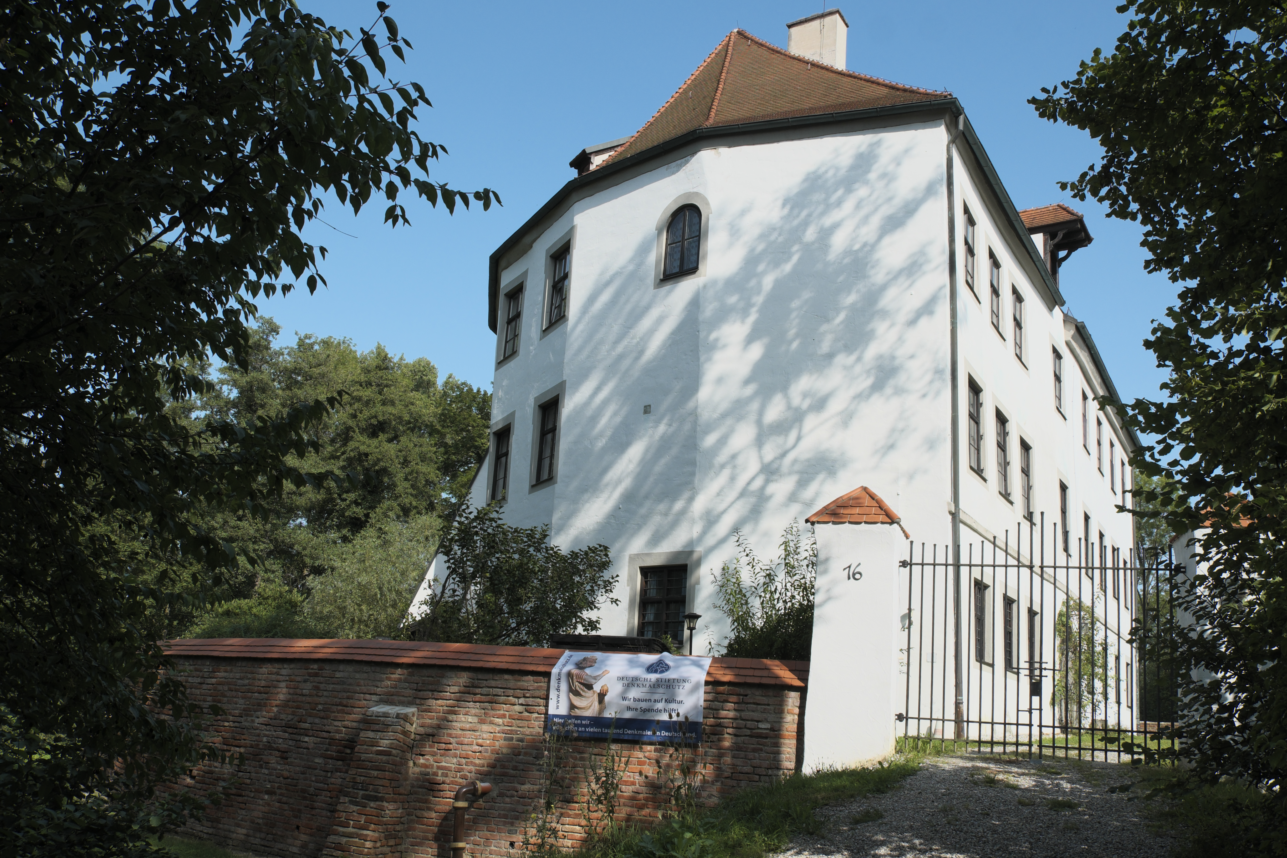 Wasserschloss Schloss Fraunberg in Fraunberg im Landkreis Erding (Bayern/Deutschland)